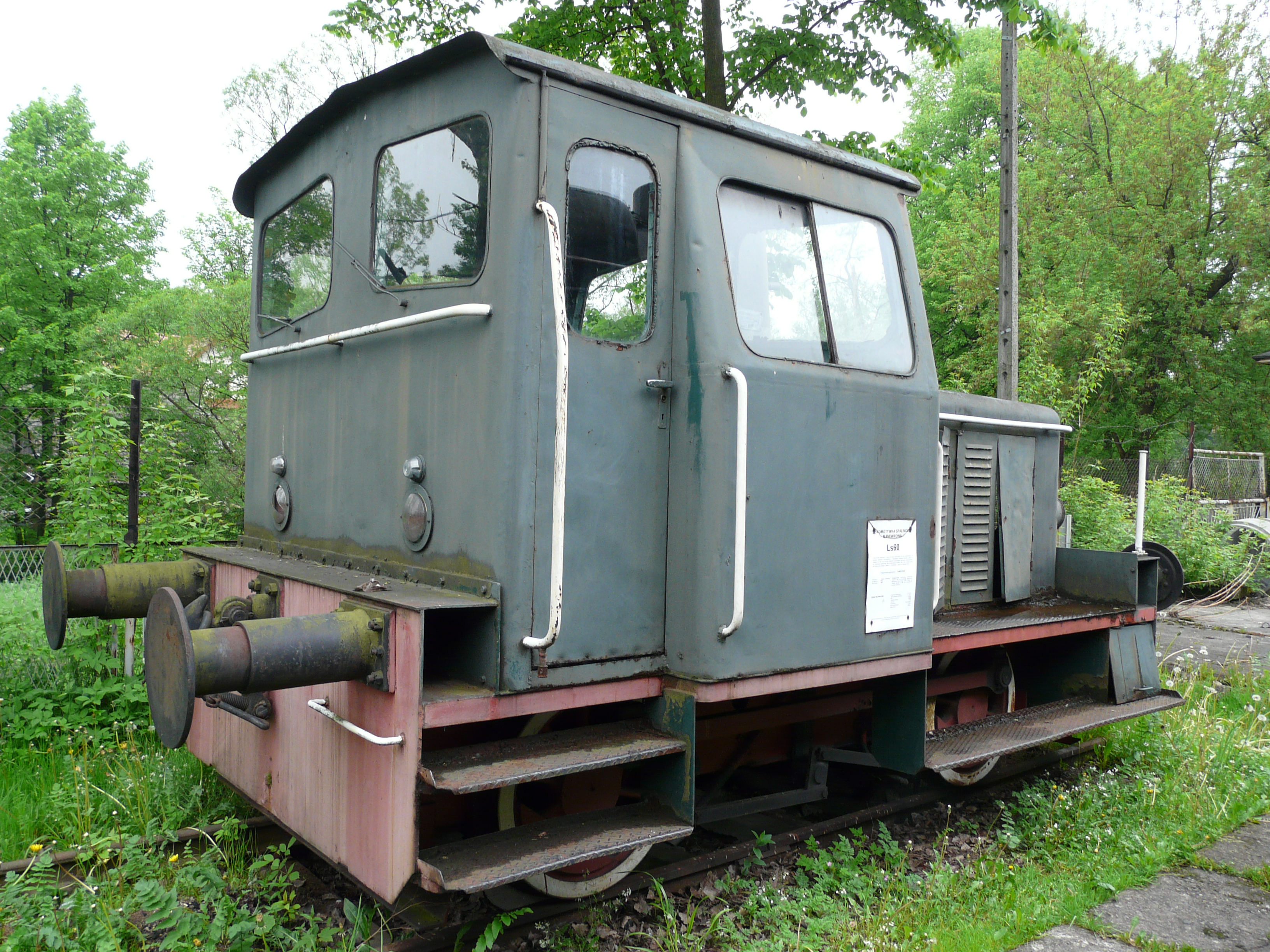 Skansen taboru kolejowego w Chabówce / Chabówka Rolling-Stock Heritage Park